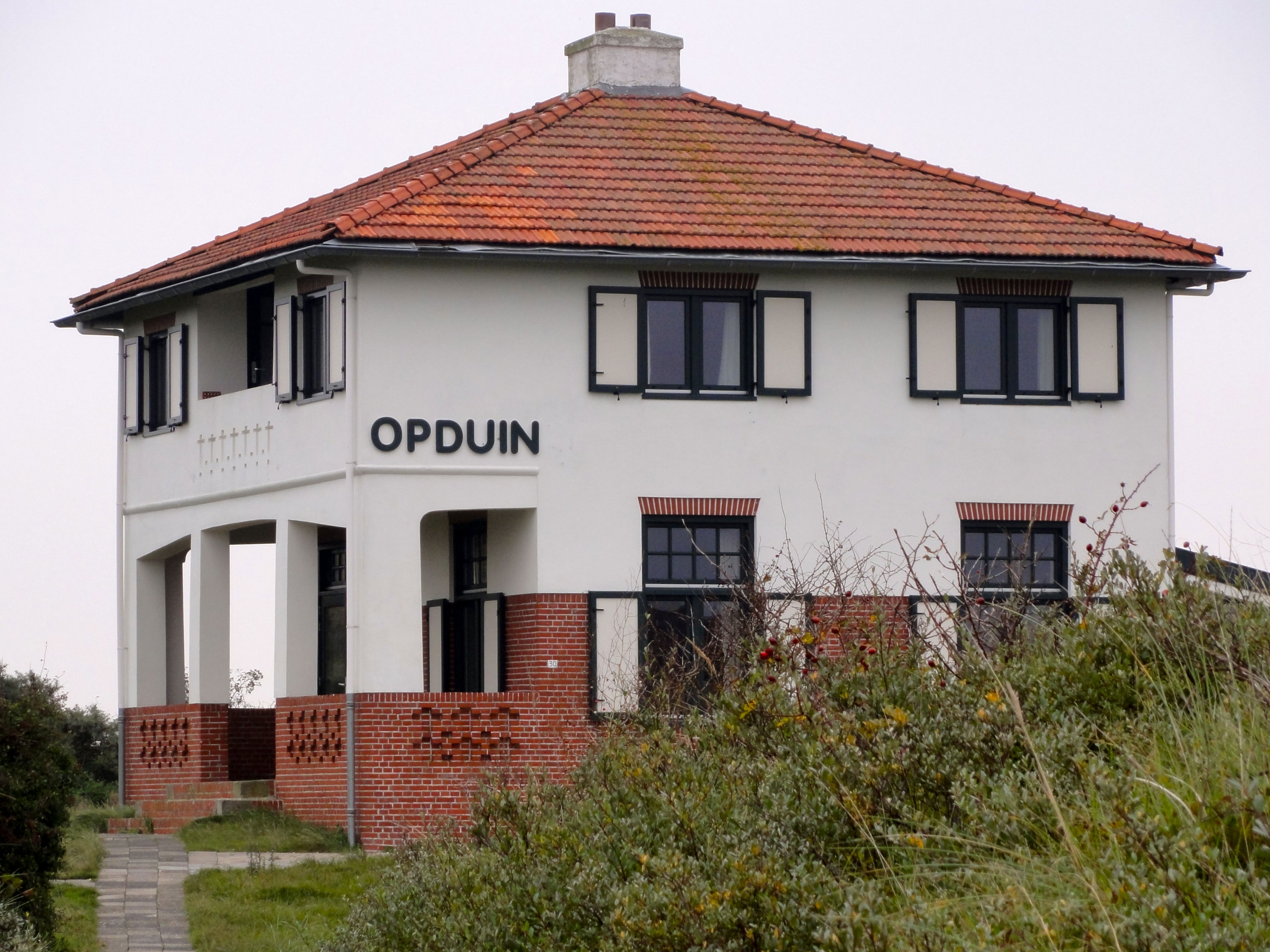 Opduin Badweg 30 in Schiermonnikoog